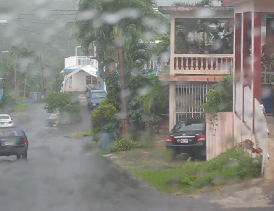 Cerca de Urbanización San Gabriel, casas y lluvia en una calle pequeña, barrio Calabazas, San Sebastián, Puerto Rico